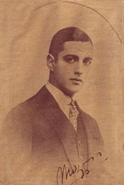 Príncipe Irakly de Bragation.